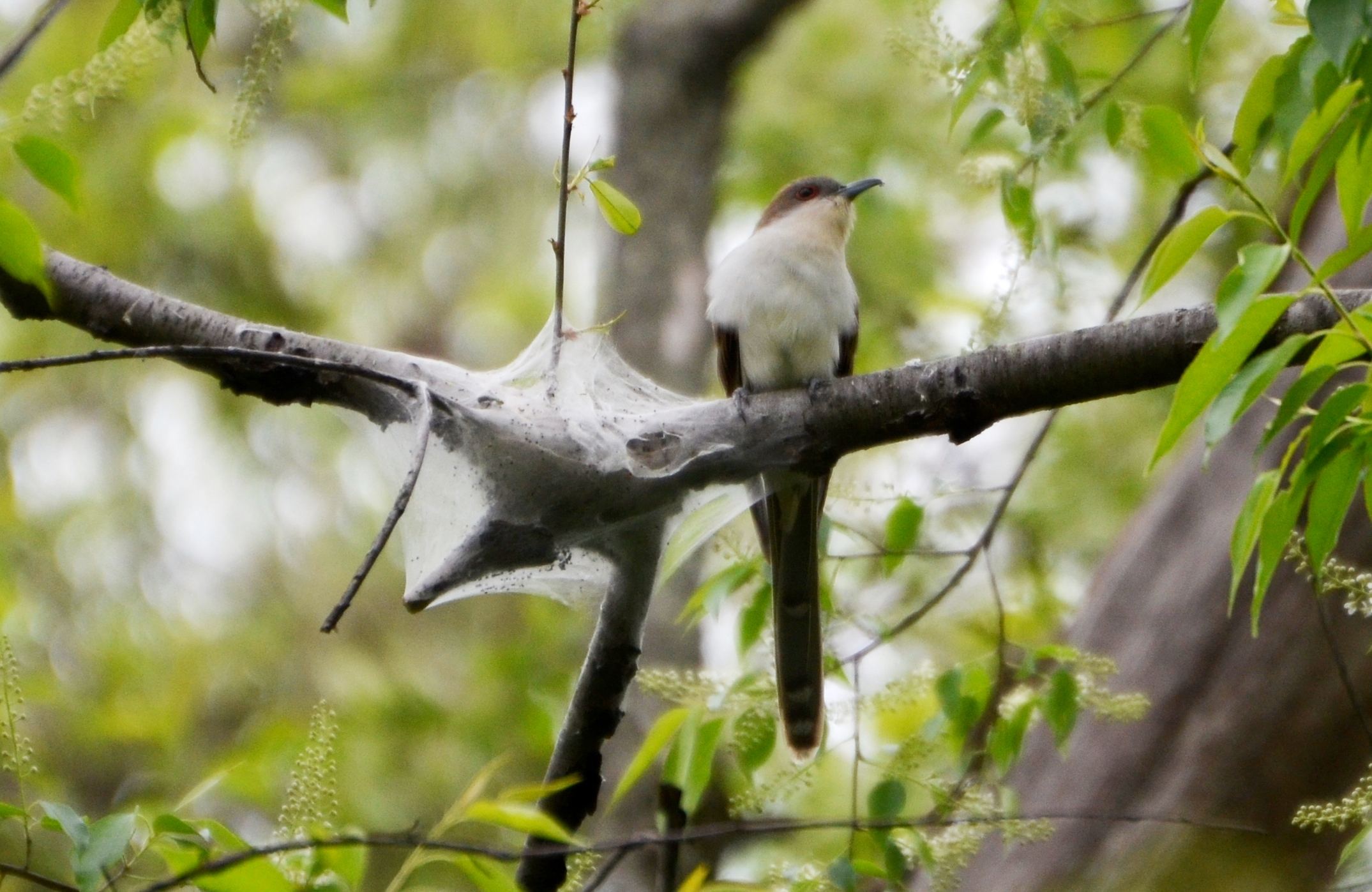 Carondelet Park 4/30/14